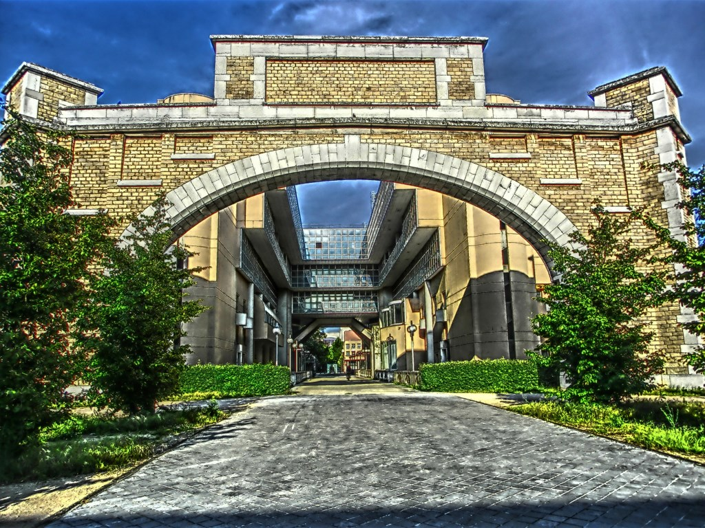 Arche école supérieure Lyon.